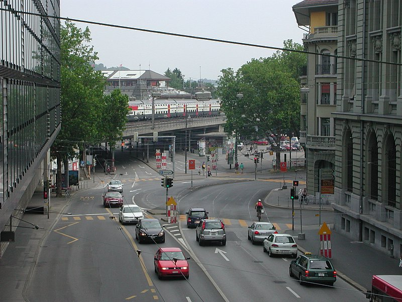 Blick von der Überführung auf das obere Bollwerk Source: photo uploaded by User:RicciSpeziari. Photographer: Riccardo Speziari